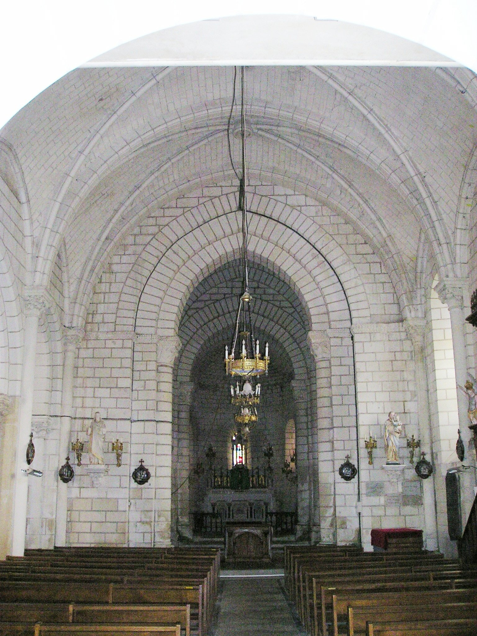 Huimes,_Kirche_Saint-Maurice_innen